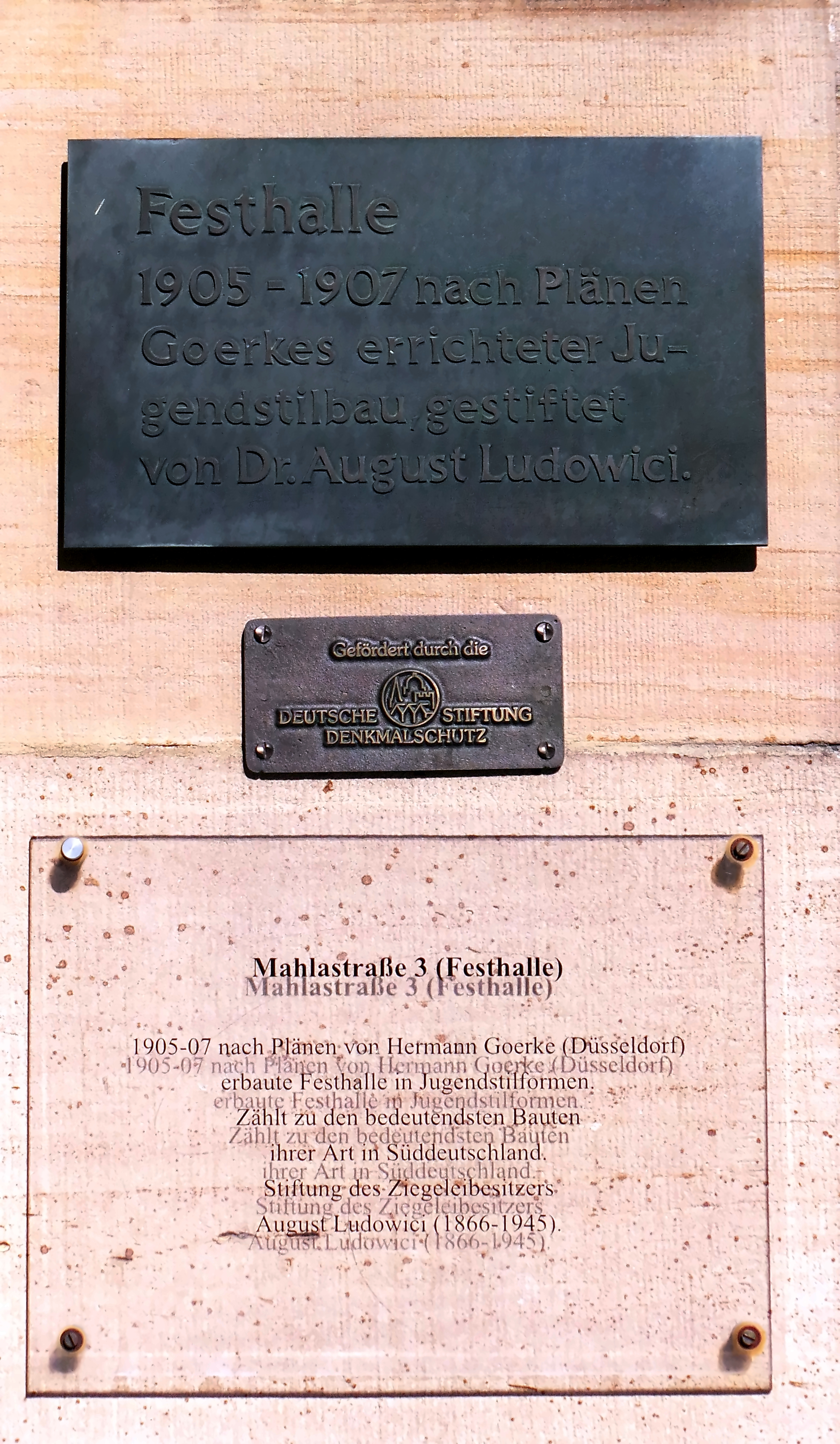 Mahlastraße 3 (Festhalle) 1905 - 07 nach Plänen von Hermann Goerke (Düsseldorf) erbaute Festhalle in Jugendstilformen. Zählt zu den bedeutendsten Bauten ihrer Art in Süddeutschland. Stiftung des Ziegelbesitzers August Ludowici (1866 - 1945).